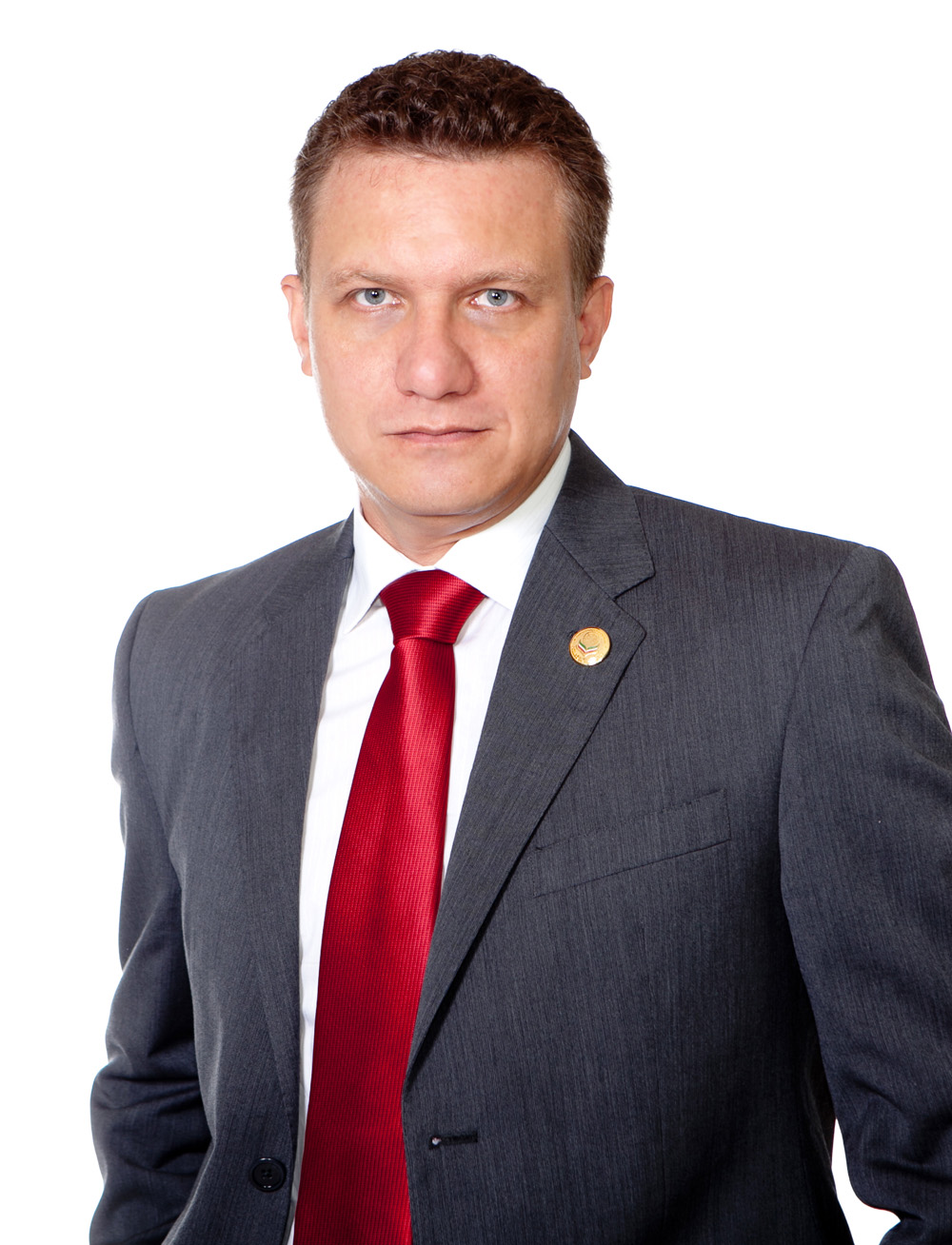 Luis García Silva